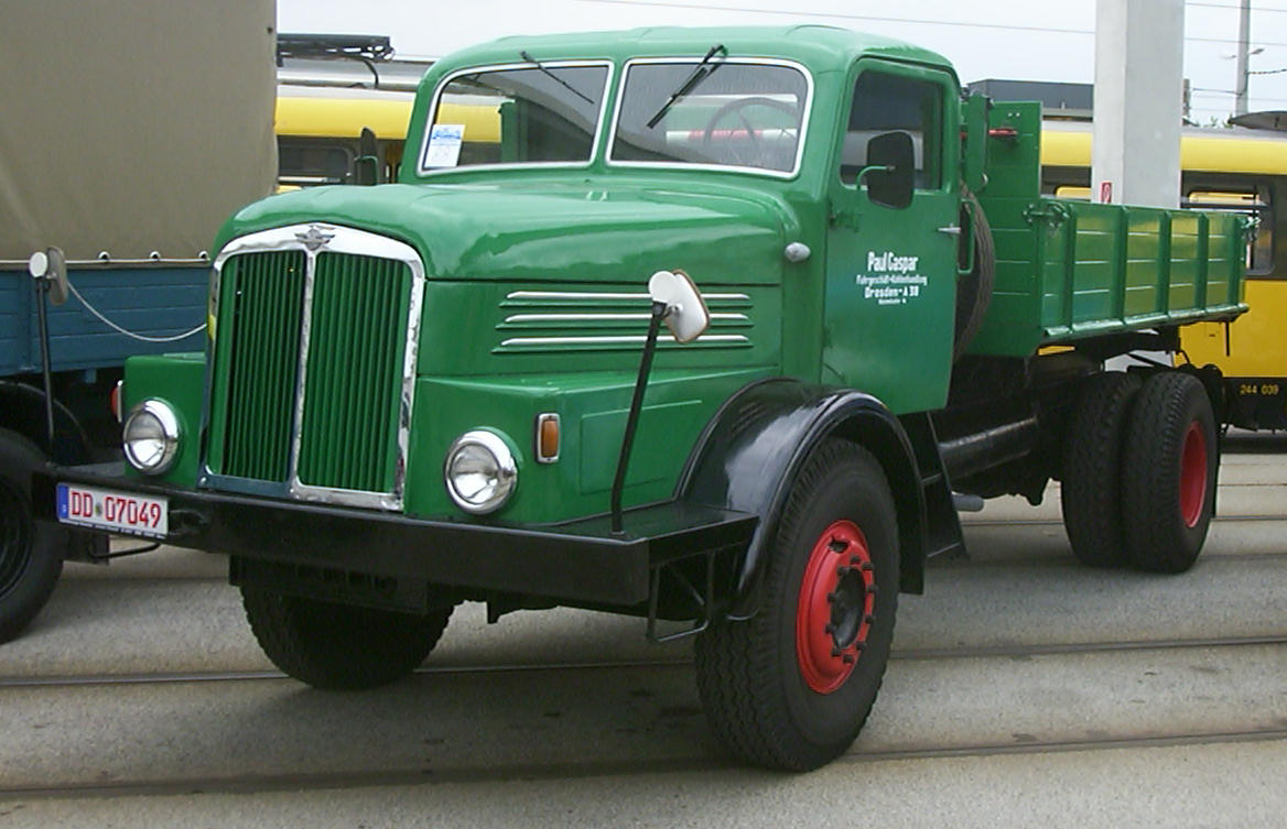 IFA H6 als Pritschenwagen